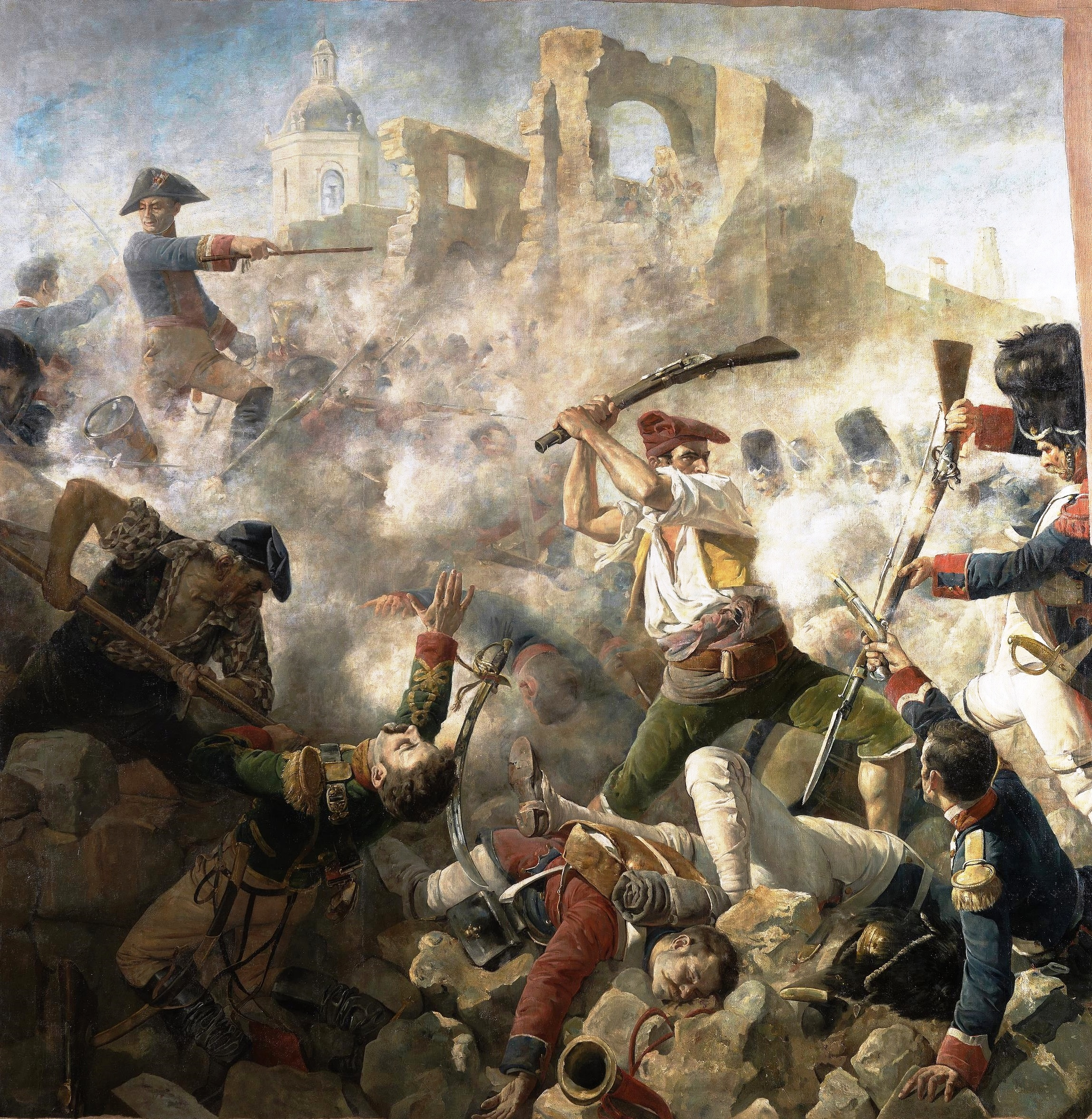 La obra representa el sitio de Gerona de 1809, ocurrido durante la Guerra de la Independencia Española.